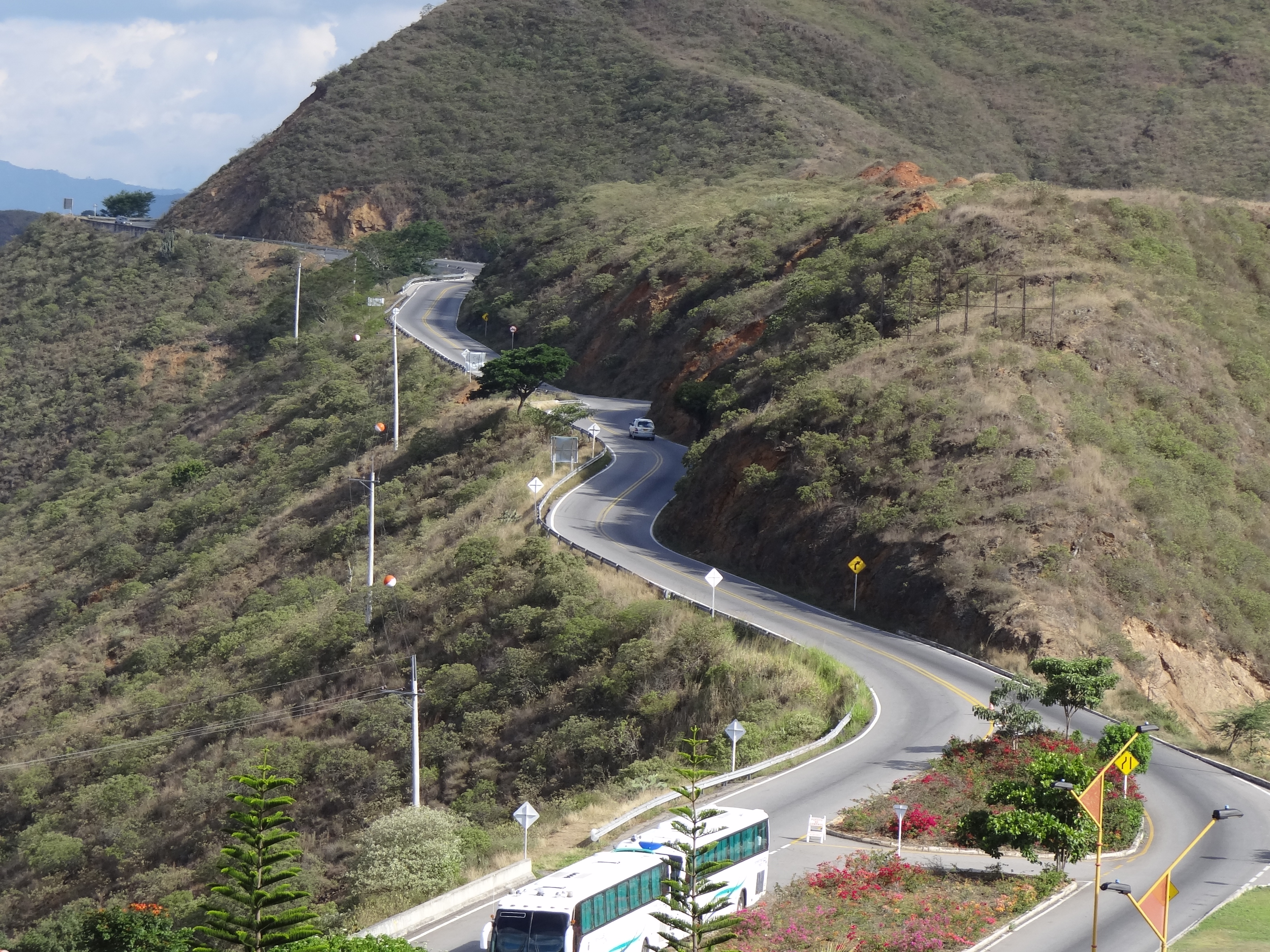 Ruta Nacional 45A o Troncal Central (Colombia) a su paso por el Parque Nacional del Chicamocha